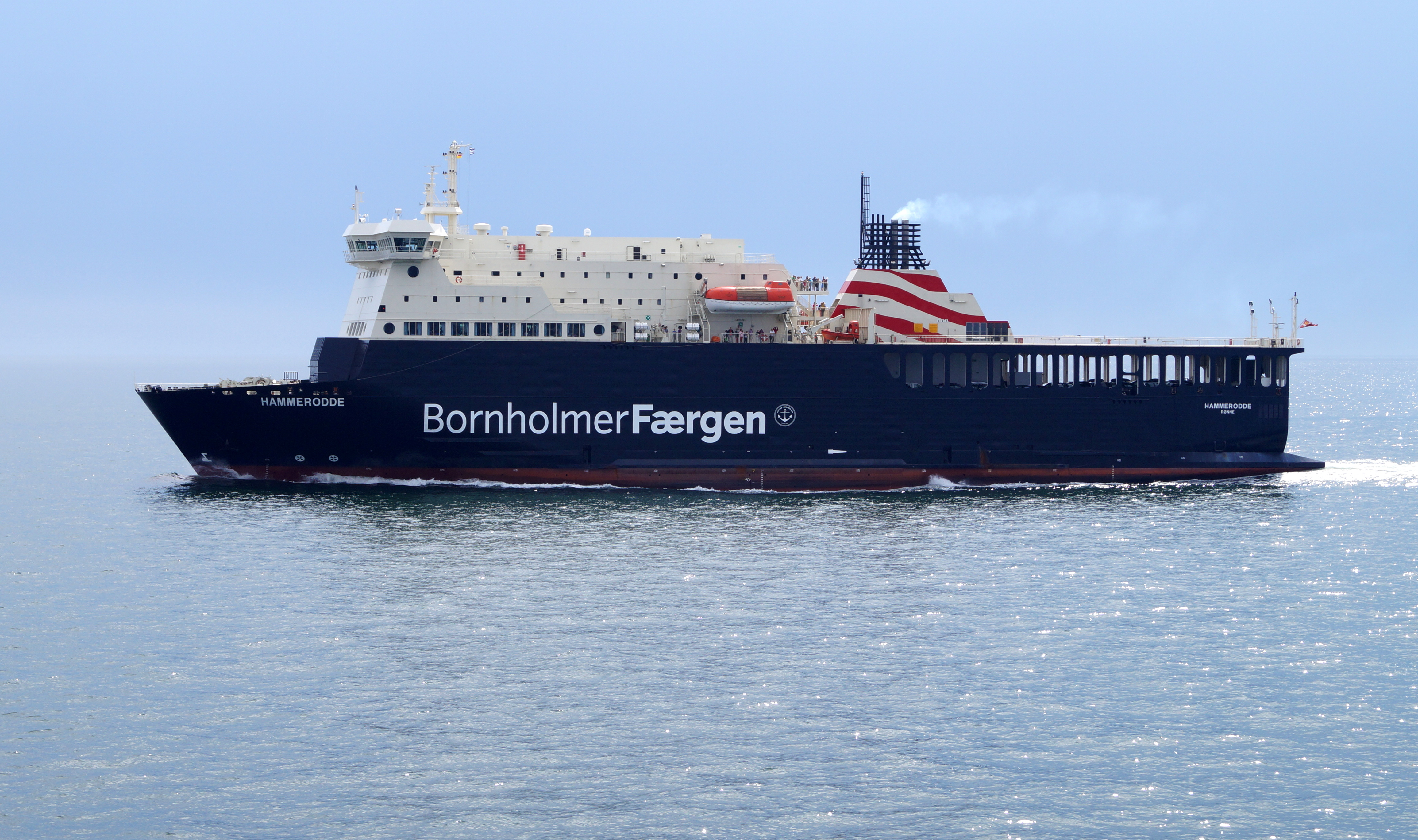 Hammerodde